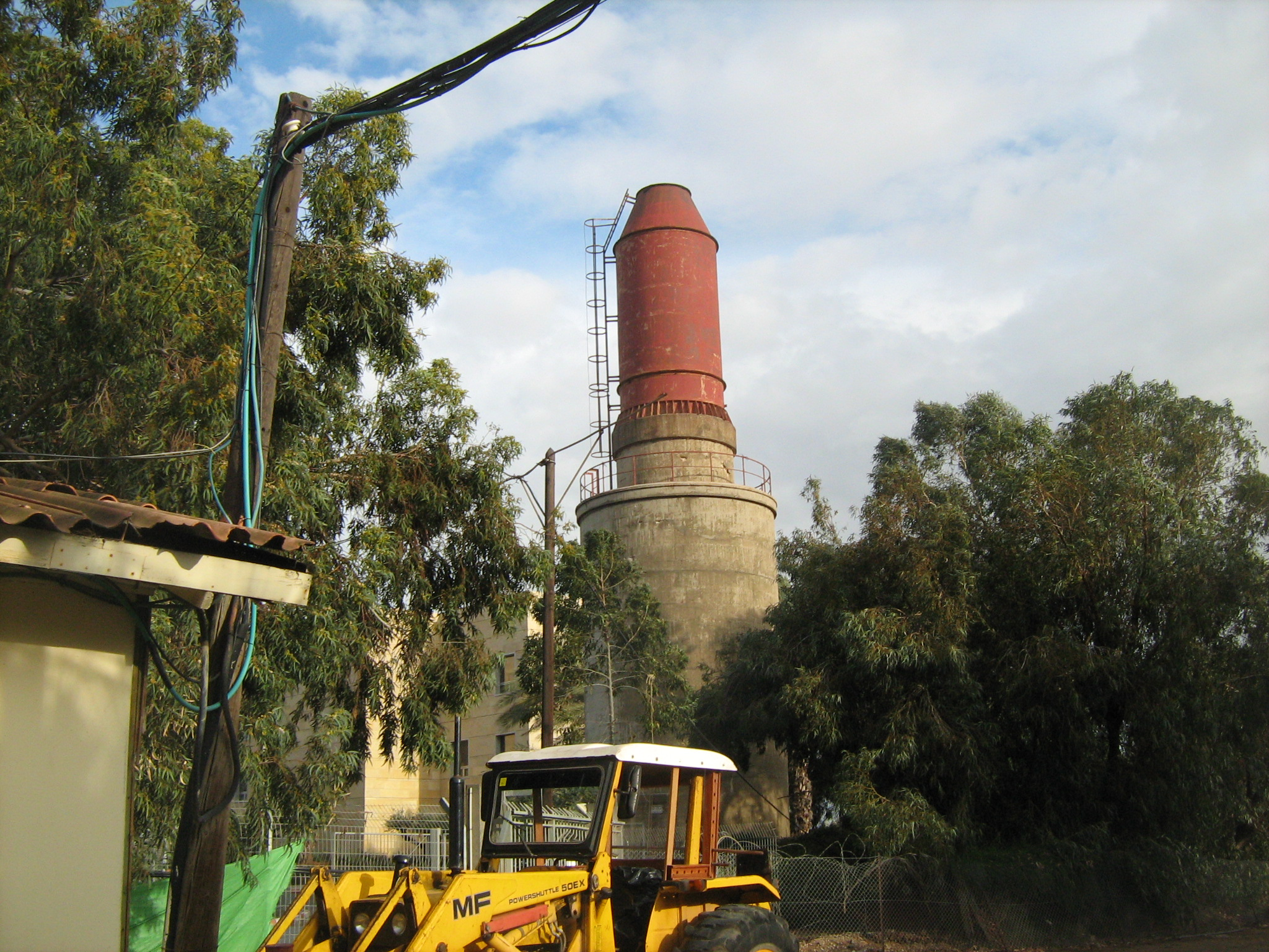 קו הרקיע של ת"א